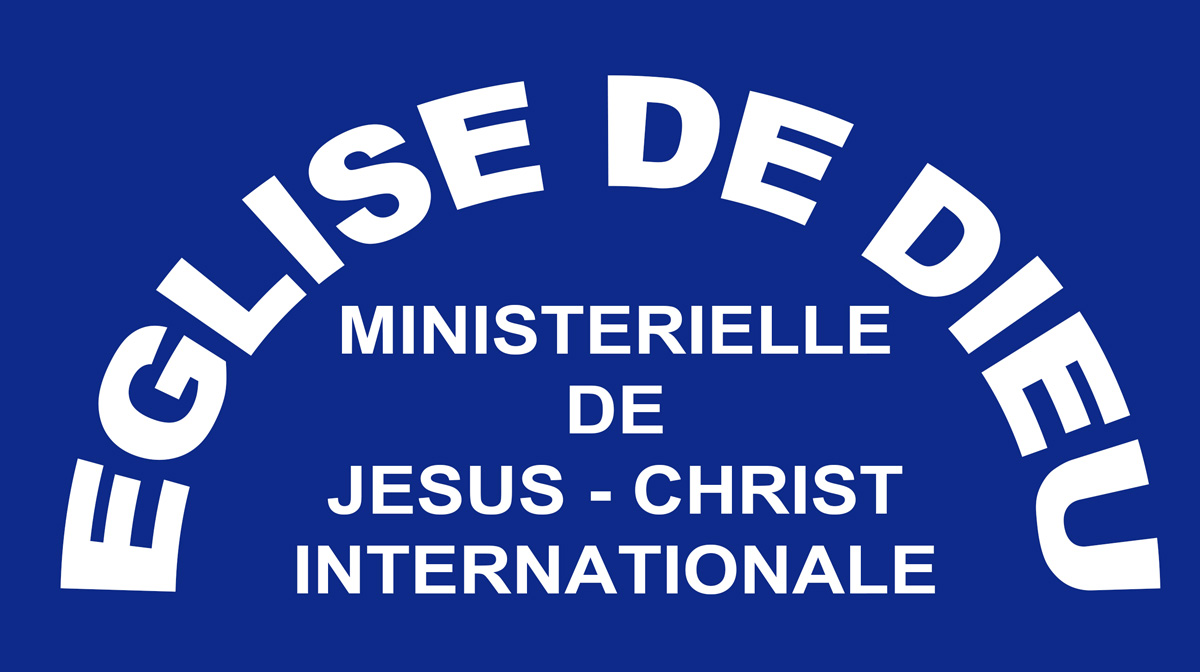 Logo Eglise De Dieu Ministerielle De Jesus Christ Internationale